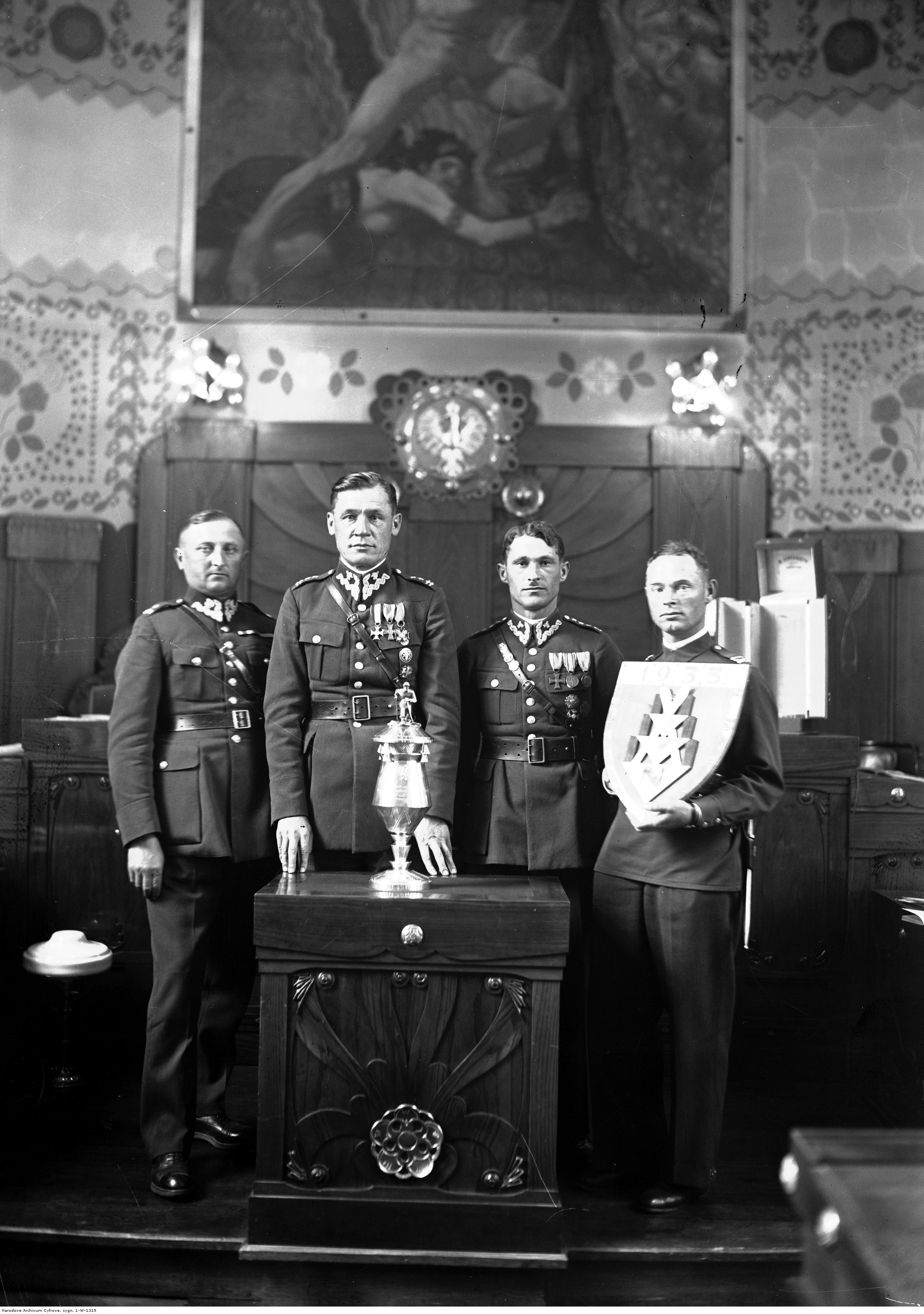 Reprezentacja narciarska 2 Pułku Strzelców Podhalańskich z pucharem oraz emblematem „Odznaki za Sprawność PZN”. Od lewej: mjr Jan Stanisław Matuszek, ppłk Józef Giza, kpt. Tadeusz Ochęduszko, plut. Brożek. Koncern Ilustrowany Kurier Codzienny - Archiwum Ilustracji. Sygnatura: 1-W-1315